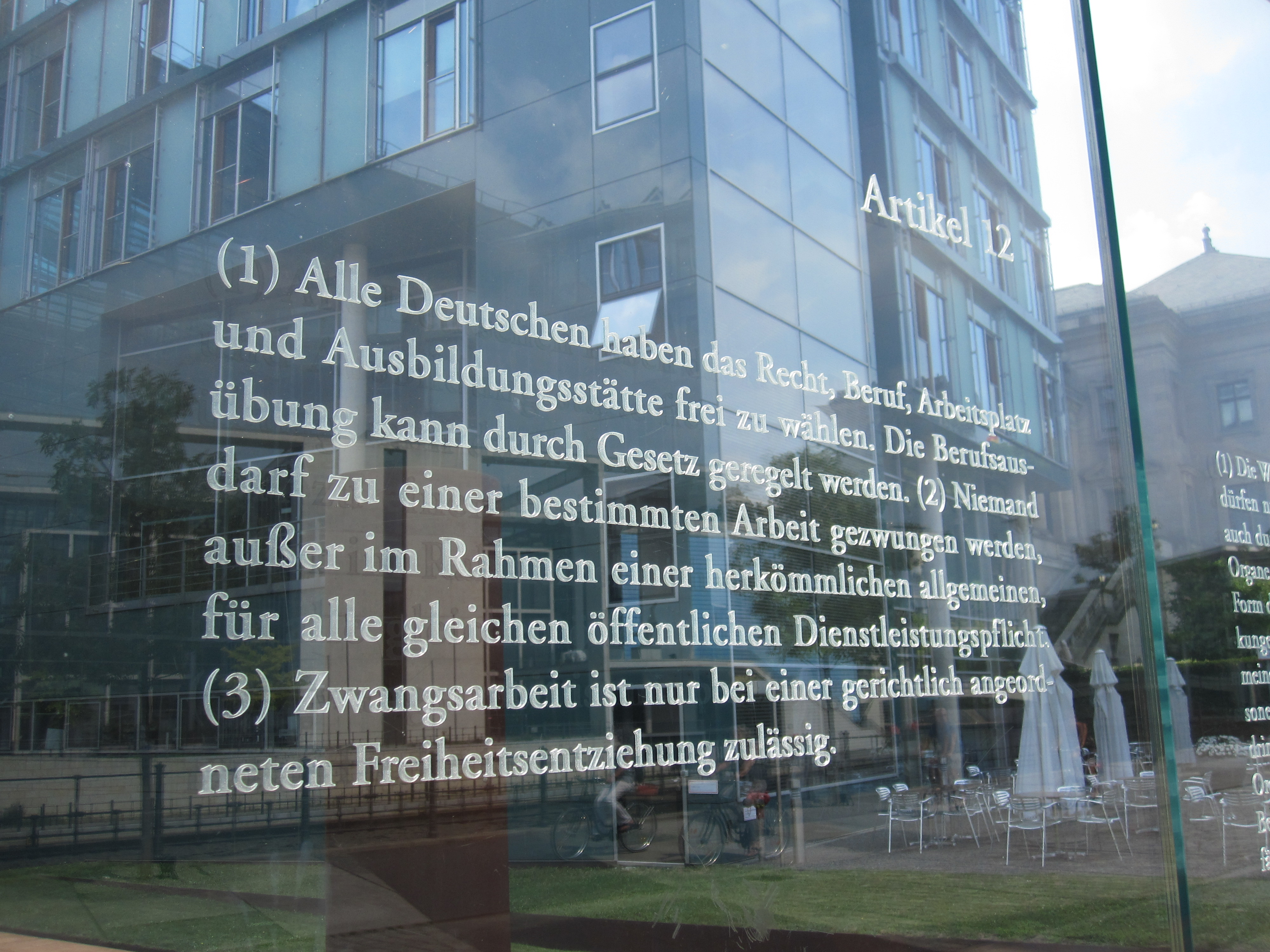 Bundestagsgebäude in Berlin: Der israelische Künstler Dani Karavan hat in drei Meter hohe Glasscheiben, die einen Außenhof des Jakob-Kaiser-Hauses im Uferbereich zur Spree begrenzen, die 19 Grundrechtsartikel des Grundgesetzes mit Laser eingraviert. „Die Grundrechtsartikel schweben gleichsam in Augenhöhe vor dem Haus der Fraktionen, dem Jakob-Kaiser-Haus“ (Andreas Kaernbach, Deutscher Bundestag).